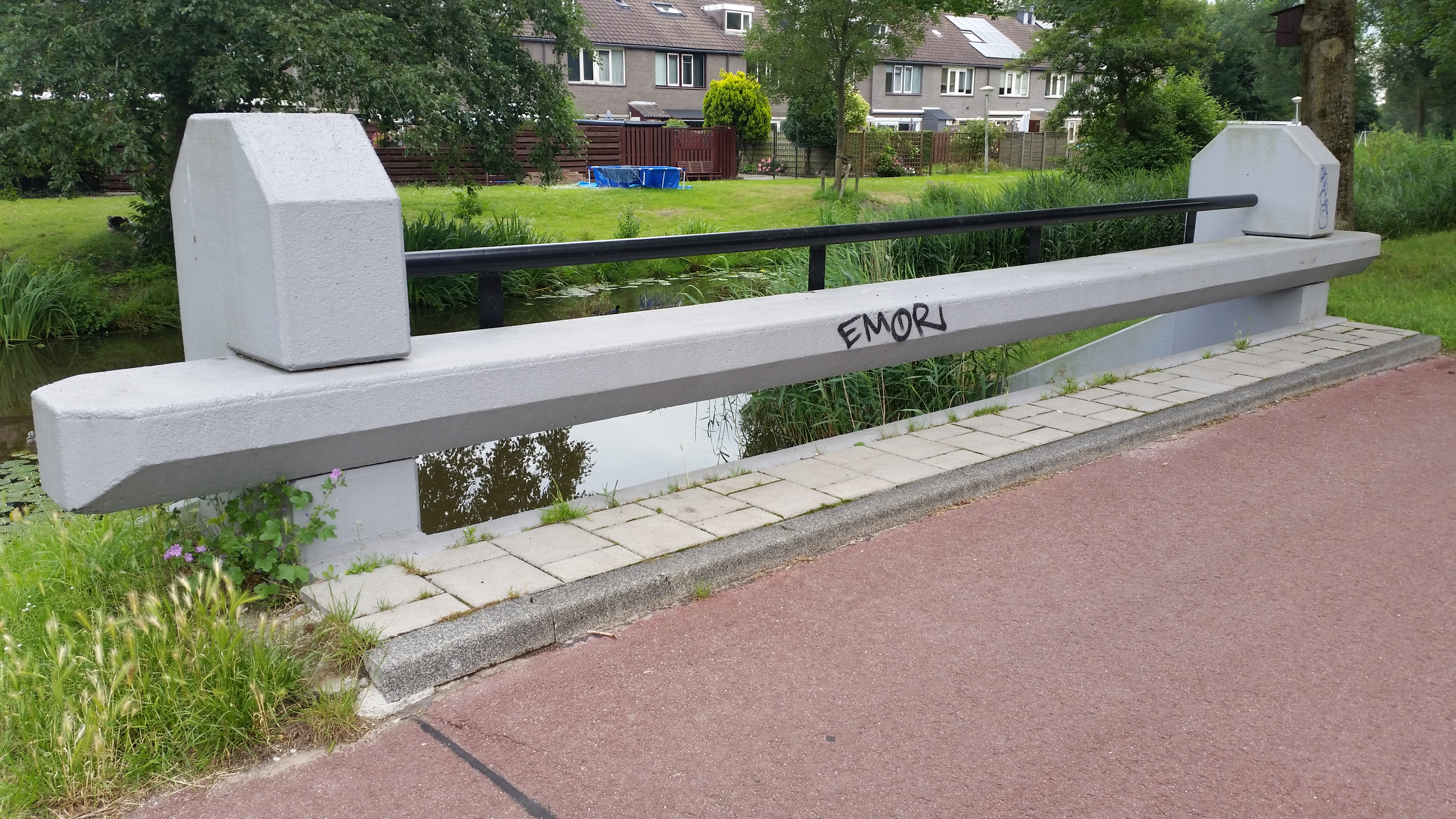 Impressie van brug 1444 in het Abcouderpad, Amsterdam-Zuidoost